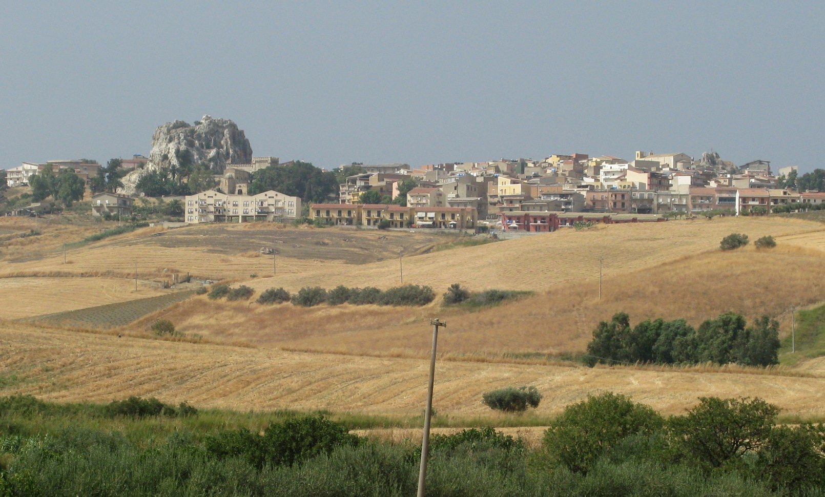 Panorama di Joppolo Giancaxio.